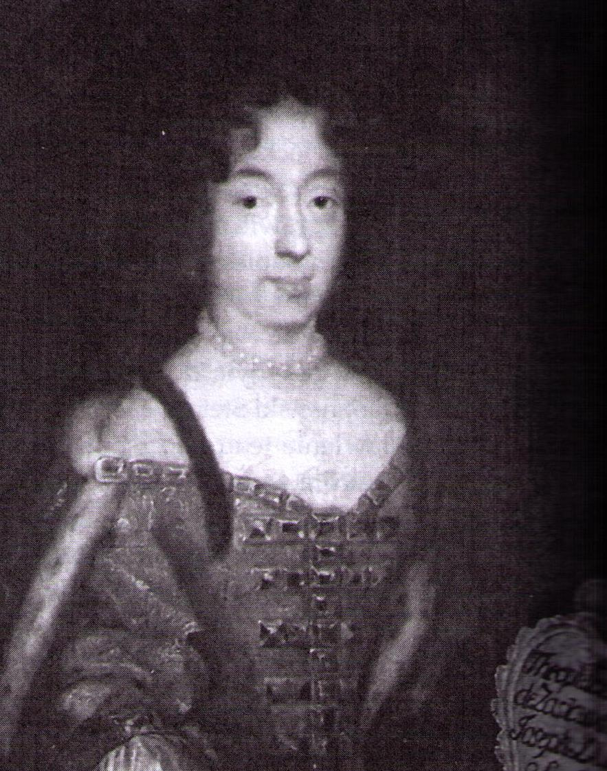 Teofila Zasławska